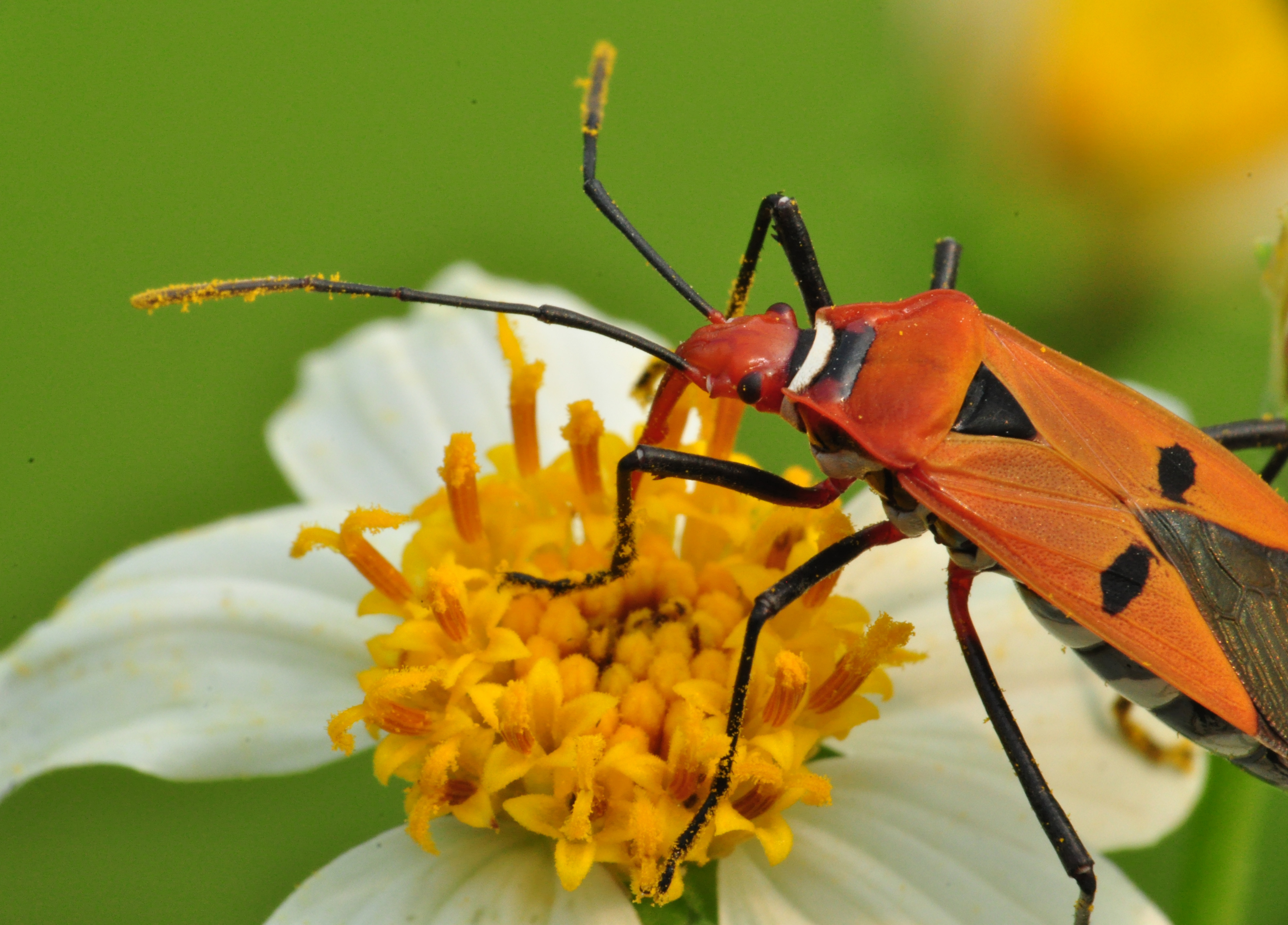 Kumbang Assasin yang memakan serbuk sari di bunga ketul (Bidens pilosa) dan secara tidak langsung kumbang menjadi perantara penyerbukannya, dimana serbuk sari yang menempel di kaki kumbang menyebar ke bunga ketul yang lainnya ketika kumbang tersebut berpindah.